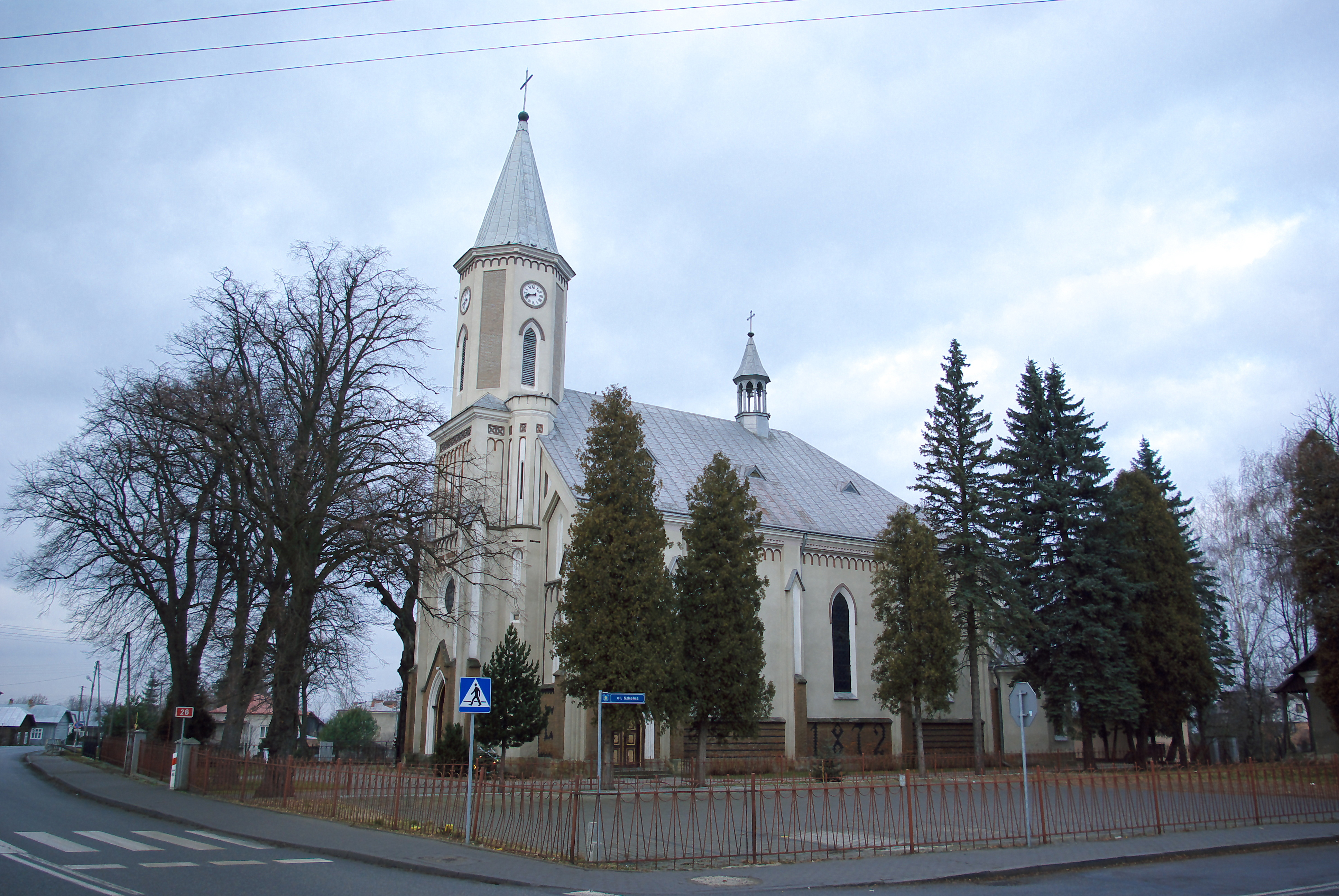 Kościół św. Marcina i Matki Bożej Szkaplerznej w Zarszynie.